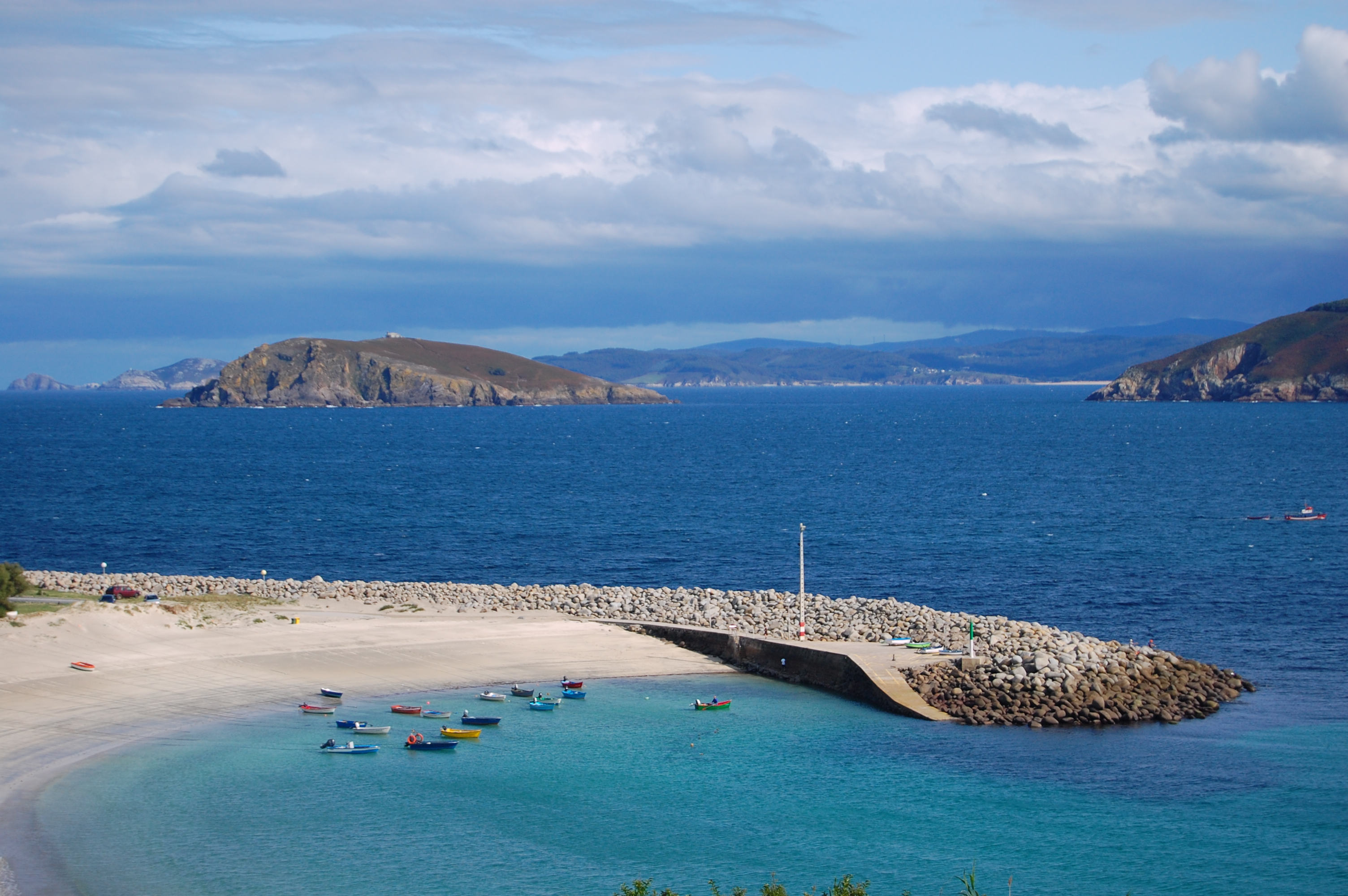 Peirao do Caido no Porto de Bares e parte septentrional da praia de Bares, a máis nórdica de España e pertencente ó Lugar de Importancia Comunitaria Estaca de Bares. A illa Coelleira e a punta do Embarcadoiro están en segundo plano. Ó fondo poden albiscarse o illote do Ansarón, a punta do Roncadoiro e a boca da ría de Viveiro, onde se aprecia a praia do Esteiro. En último plano parece distinguirse parte da punta de Morás, tras o illote do Ansarón. A paisaxe tras a ría do Barqueiro pertence ó LIC Costa da Mariña Occidental. This is a photography of a Special Area of Conservation in Spain with the ID: ES1110010. Natura2000 entry, EEA entry This is a photography of a Special Area of Conservation in Spain with the ID: ES1120017. Natura2000 entry, EEA entry